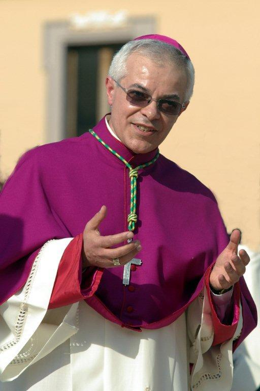 Monsignor Francesco Alfano Arcivescovo di Sorrento-Castellammare di Stabia